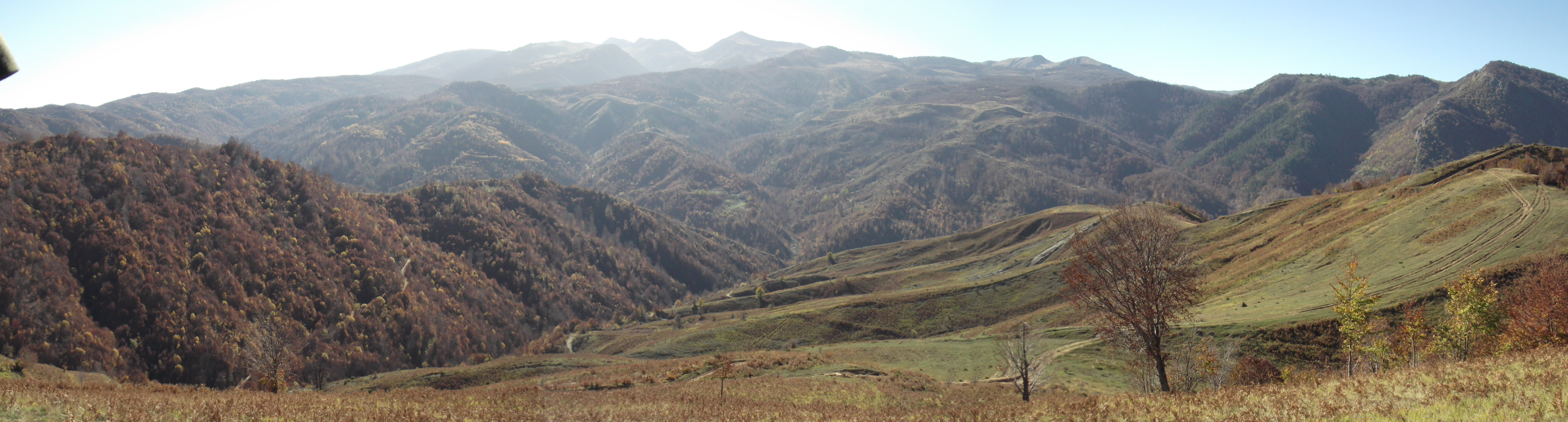 Guri i Nikes, Pogradec